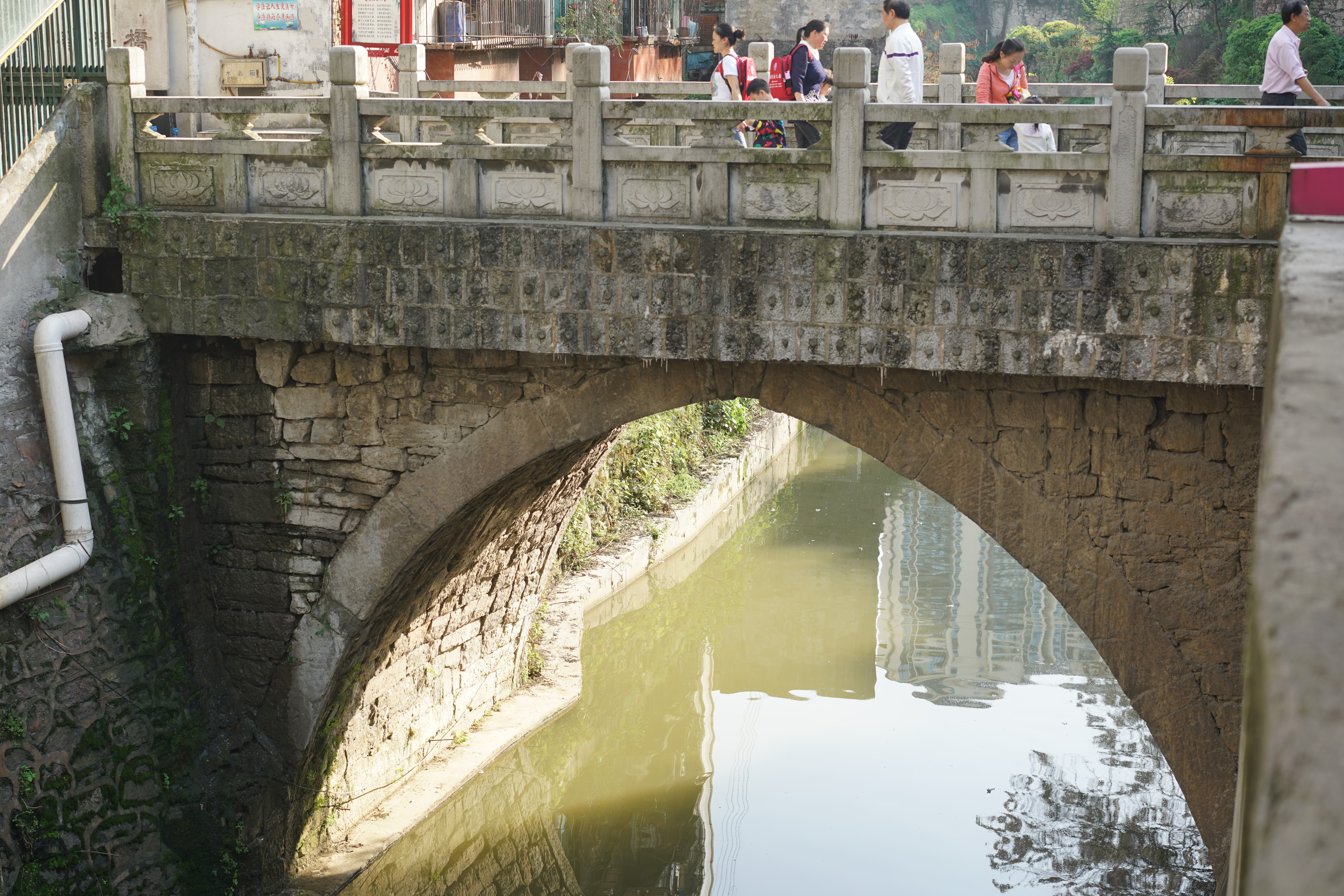 中文（中国大陆）: 普济桥 遵义